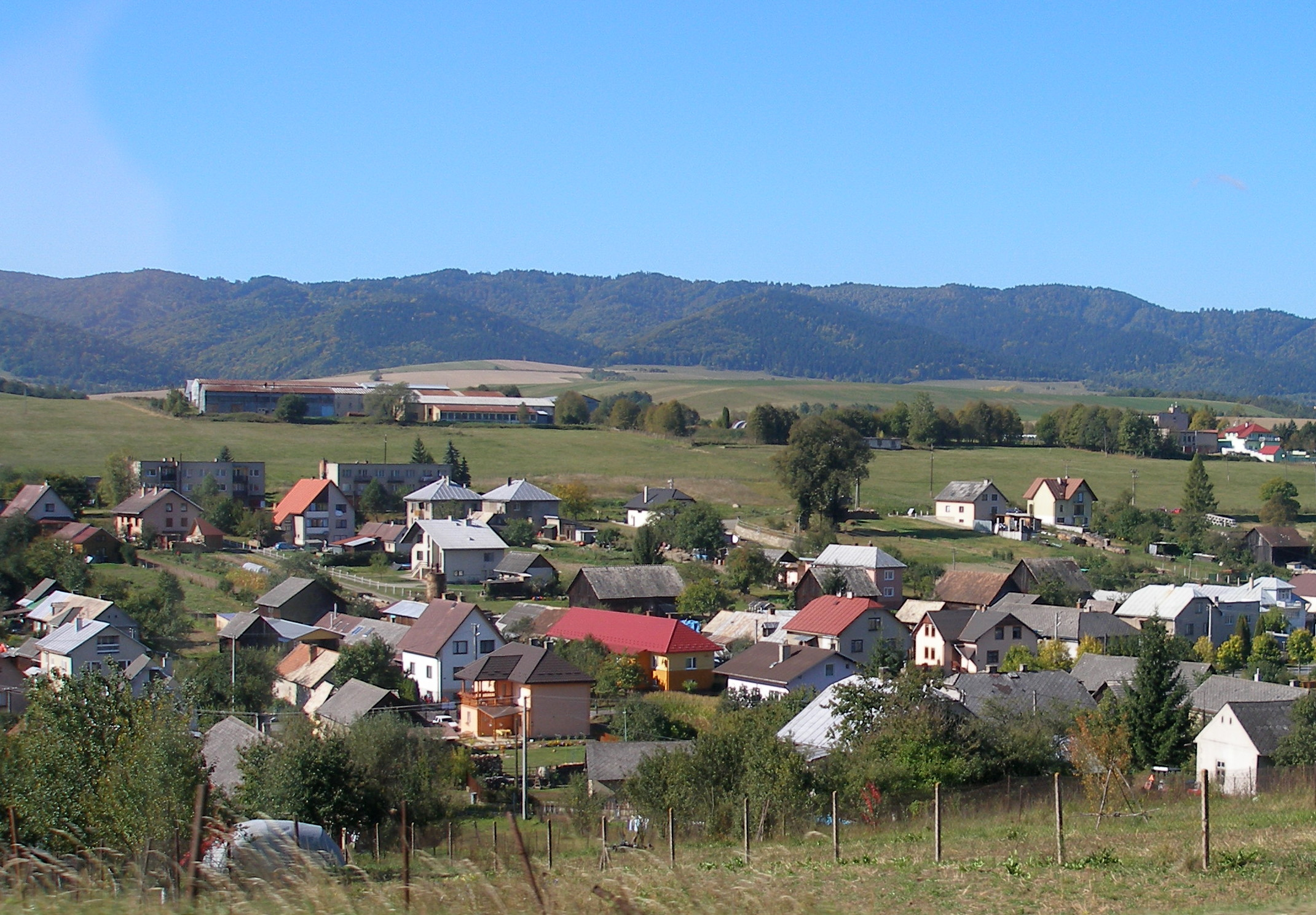 Obec Kľušov okres Bardejov